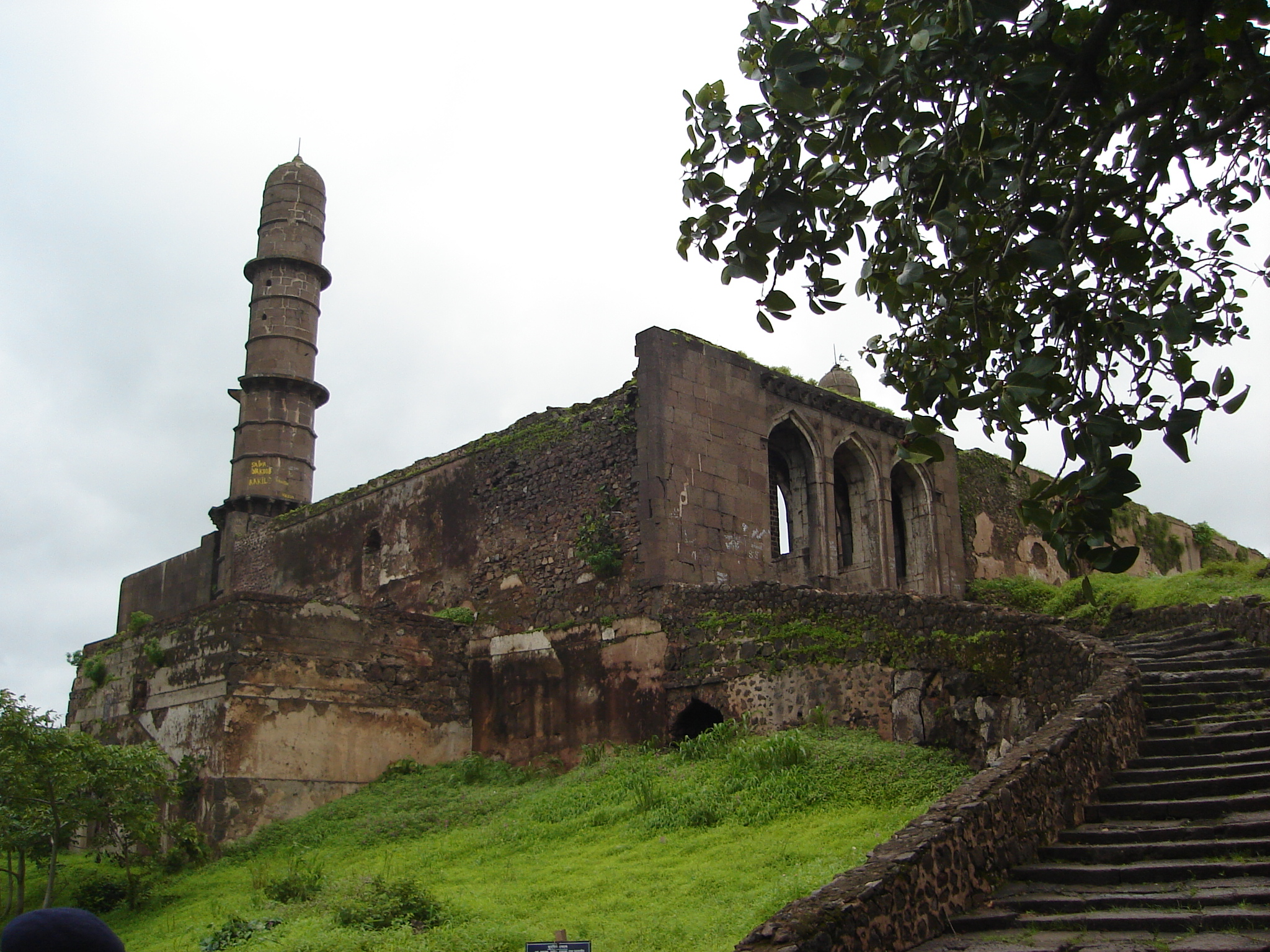 Asirgarh fort near Burhanpur, Madhya Pradesh, India